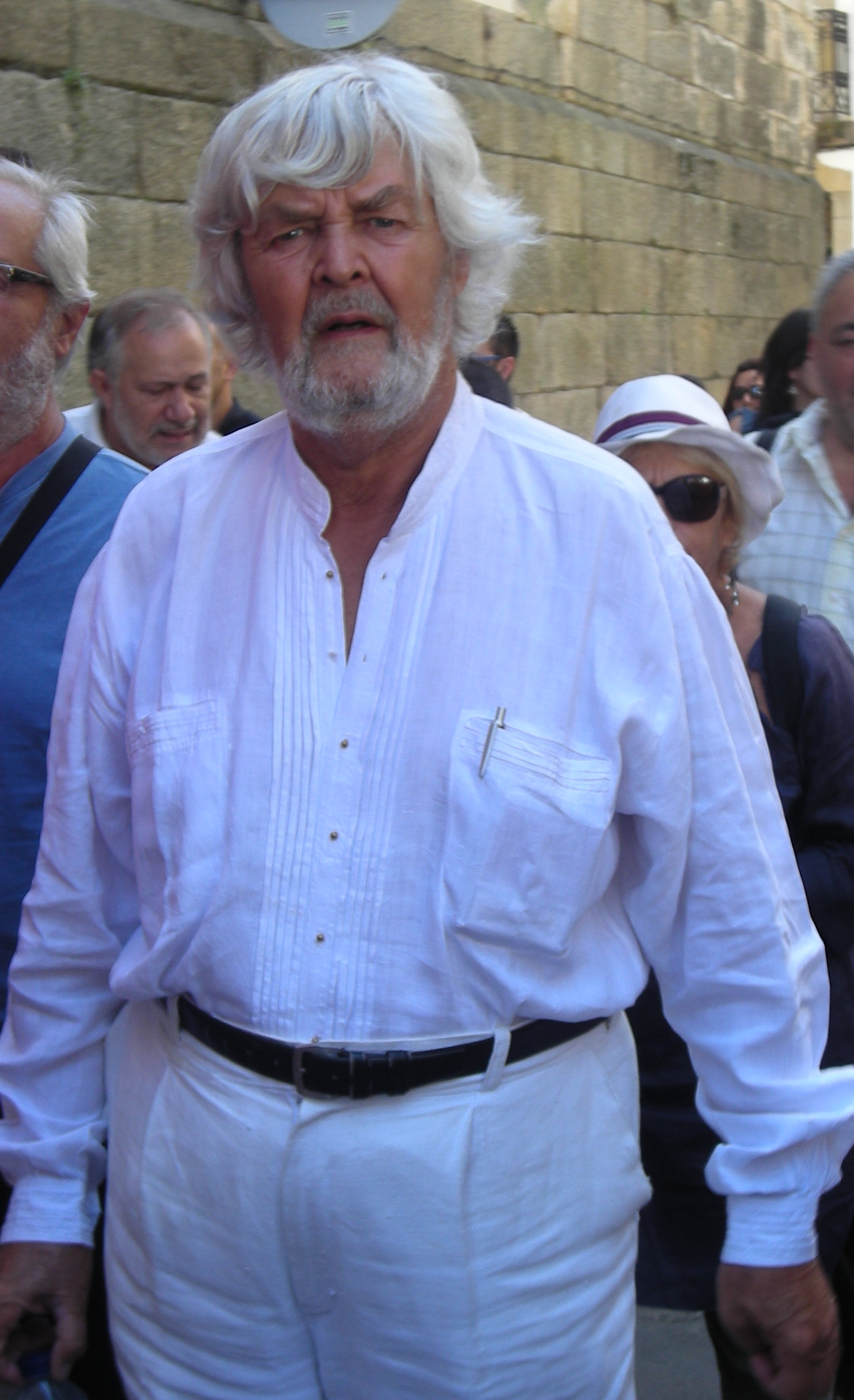 Xosé Manuel Beiras na manifestación do Día da Patria, o 25 de xullo de 2009, en Compostela.